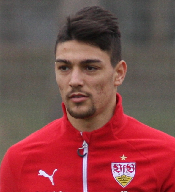 Federico Barba bei seinem ersten VfB-Training. Bild von